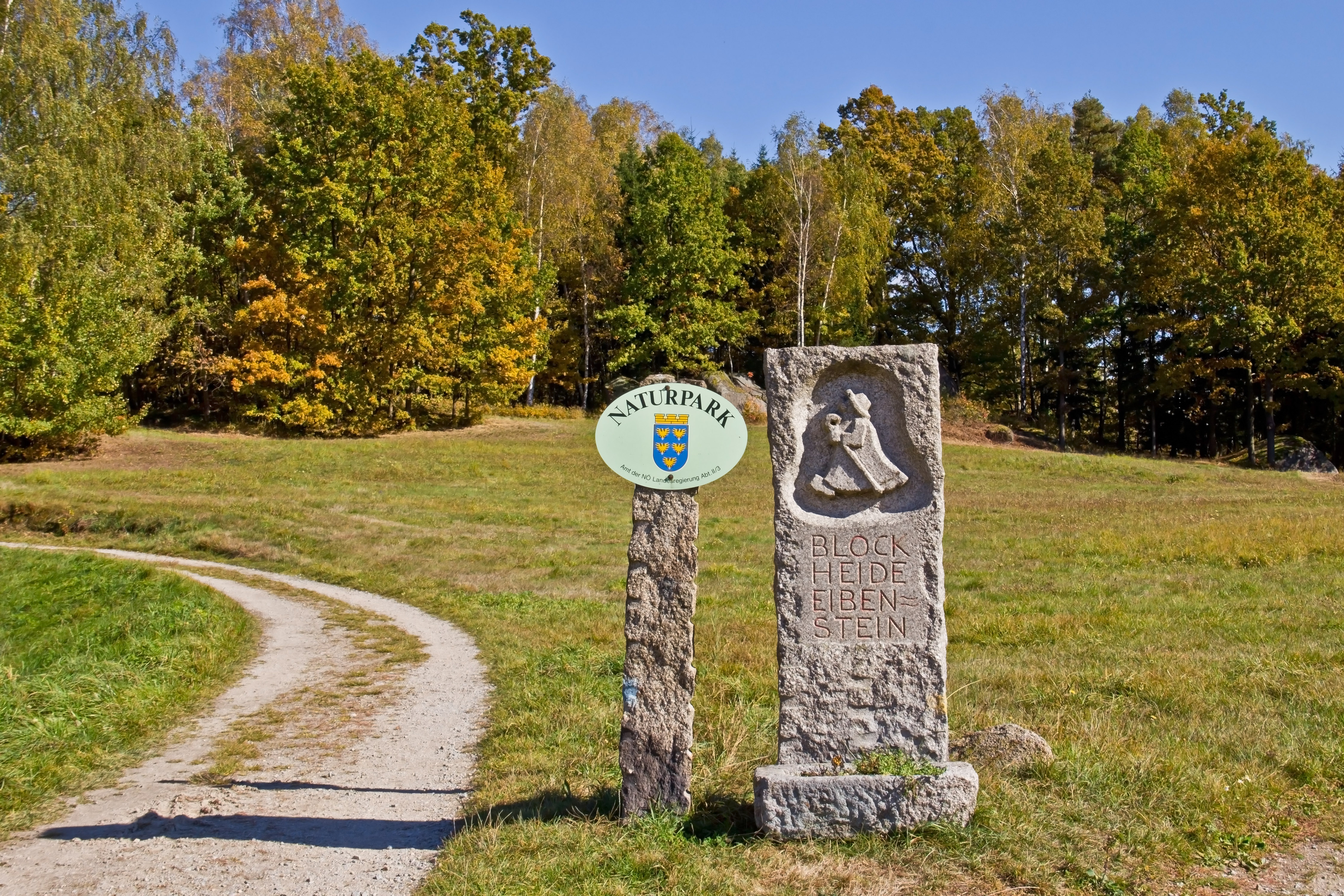 Eingang zum Naturpark Blockheide